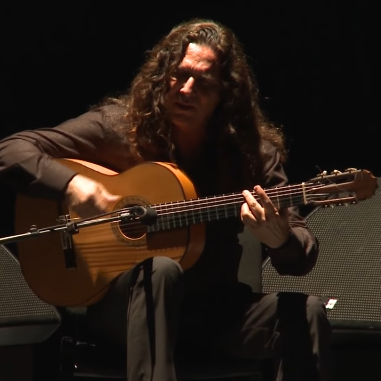 Ovación a “Tomatito” por su flamenco en el Festival Internacional Cervantino